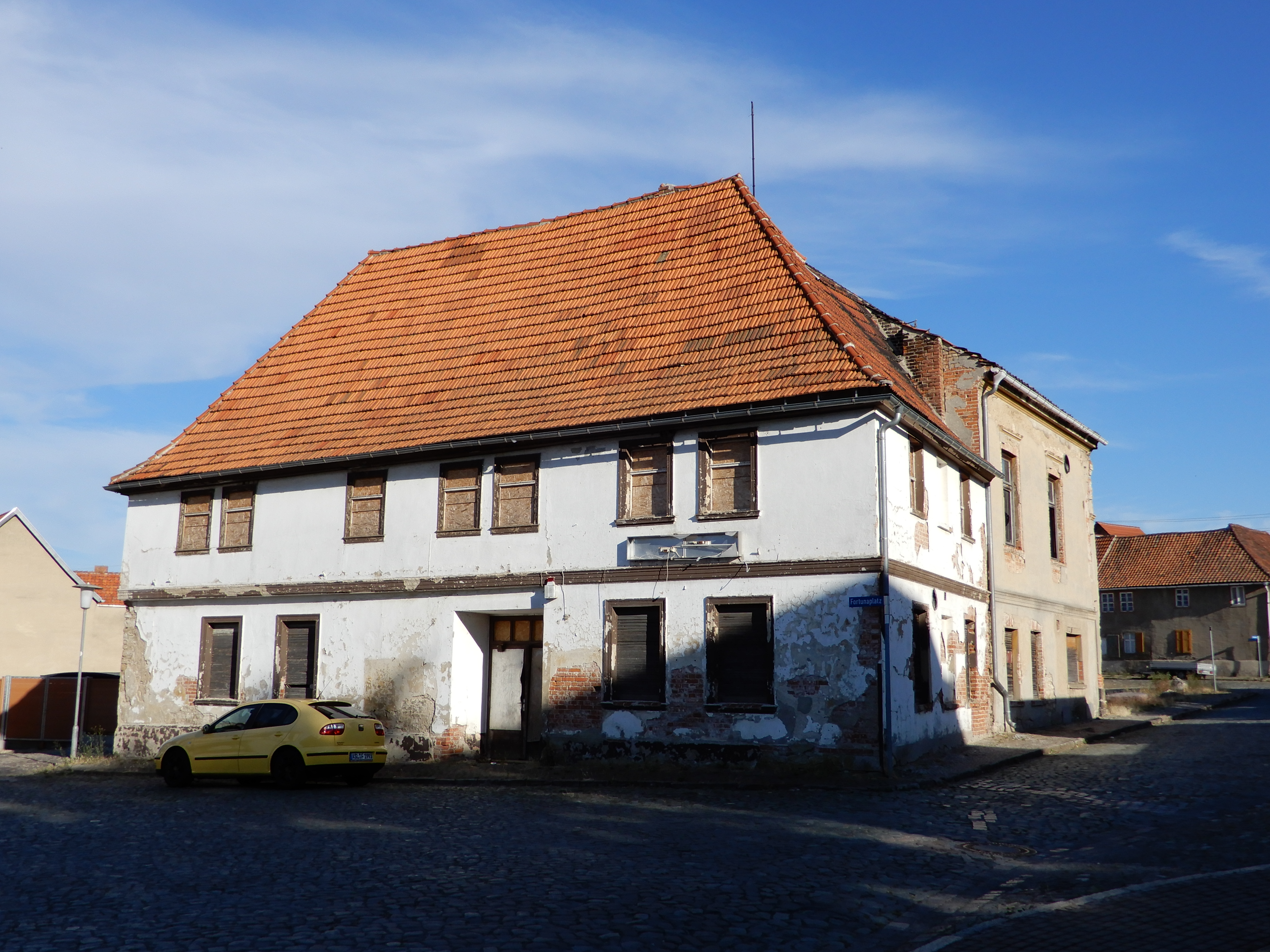 Ehemaliger Gasthof Fortuna am Fortunaplatz in Hoym